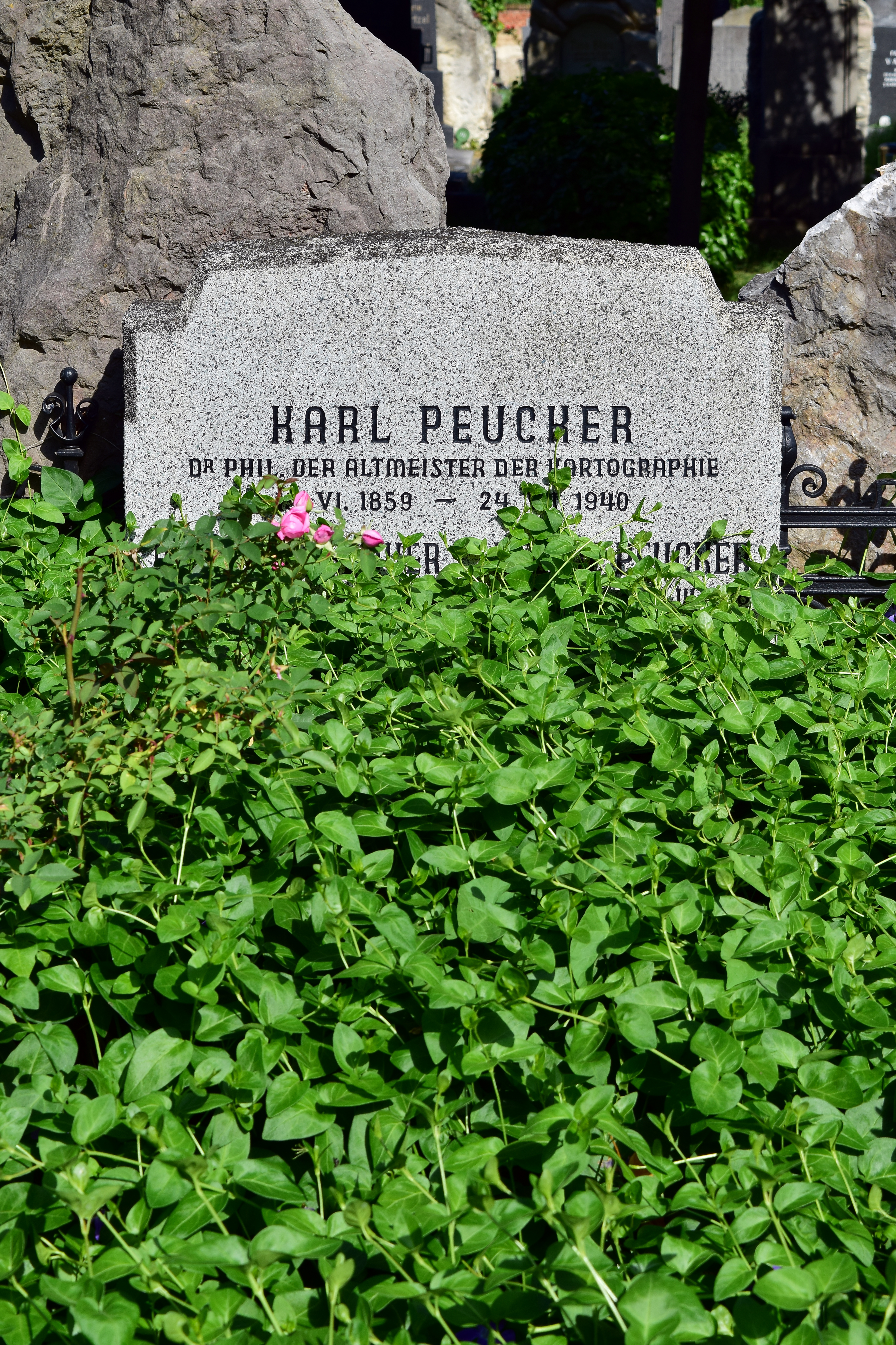 Ehrenhalber gewidmetes Grab von Karl Peucker auf dem evangelischen Friedhof im Wiener Zentralfriedhof